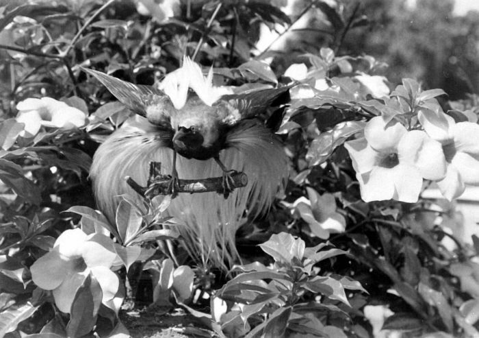 Repronegatief. Paradijsvogel